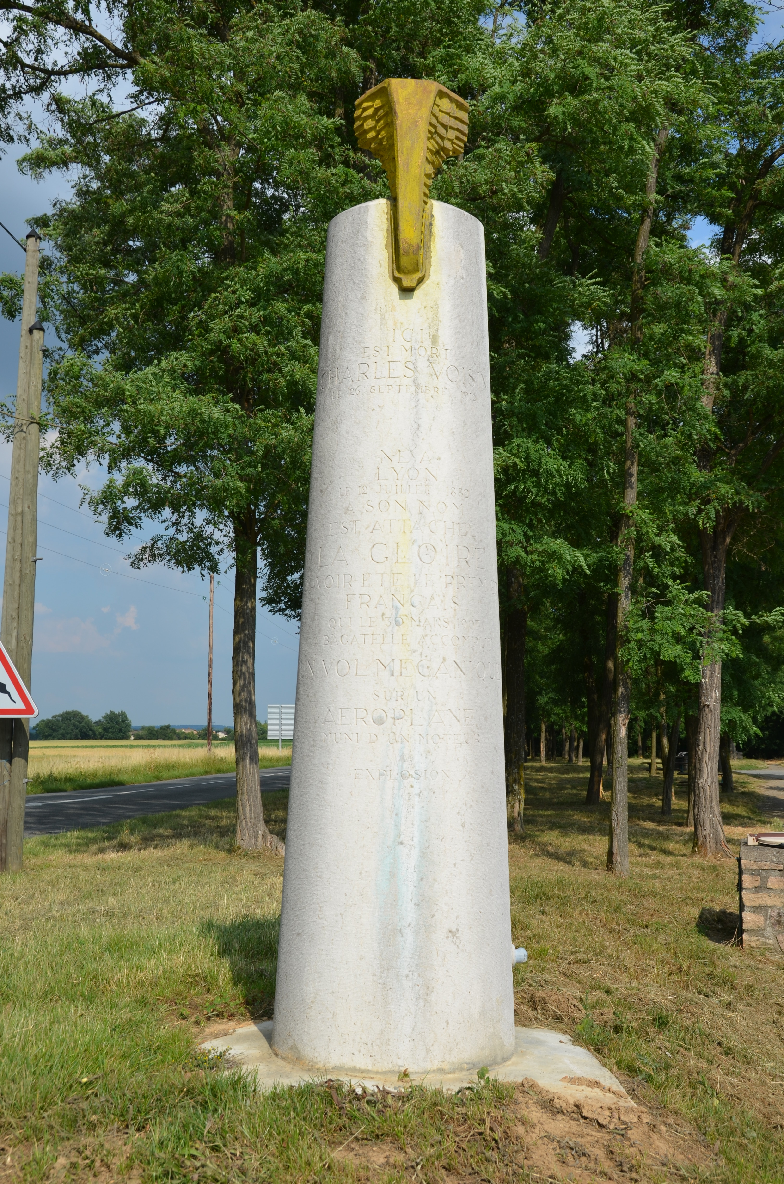 Stèle commémorant l'accident d'automobile qui coûta la vie à Charles Voisin, pionnier de l'aviation française, à Corcelles-en-Beaujolais. Érigé en 1928, sa position actuelle n'est plus celle d'origine du fait de plusieurs aménagements routiers. L'inscription est la suivante " Ici est mort Charles VOISIN, le 26 septembre 1912. Né à Lyon le 12 juillet 1882. A son nom est attachée la gloire d’avoir été le premier français qui, le 15 mars 1907 à Bagatelle, accomplit un vol mécanique sur un aéroplane muni d’un moteur à explosion "